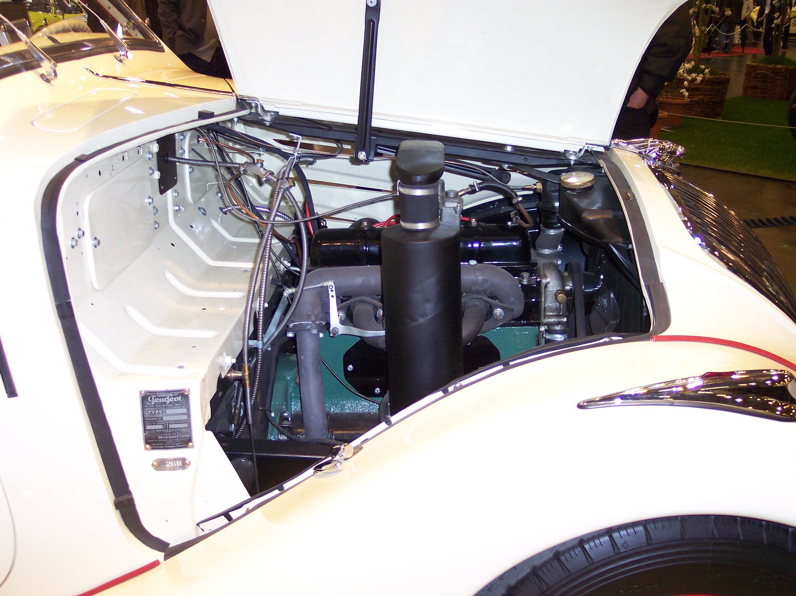 Peugeot 402 Eclipse engine